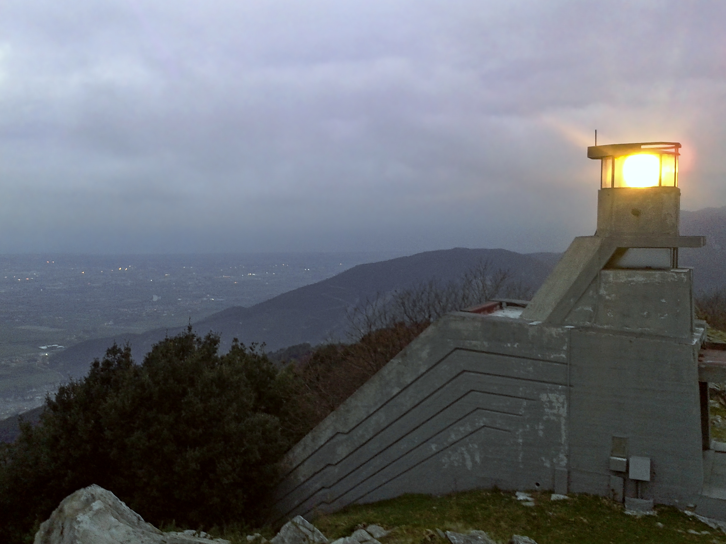 Faro del Monte Serra, monumento ai caduti dell'incidente dell'C-130H Hercules Vega 10 (3 marzo 1977)